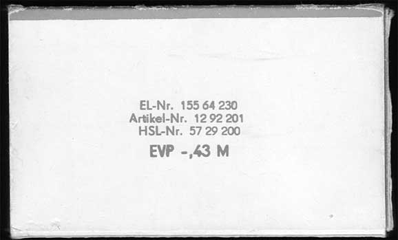 Typisches gedrucktes Preisschild aus DDR (vor 1990), Artikel: Luckanus Lochverstärkungsringe